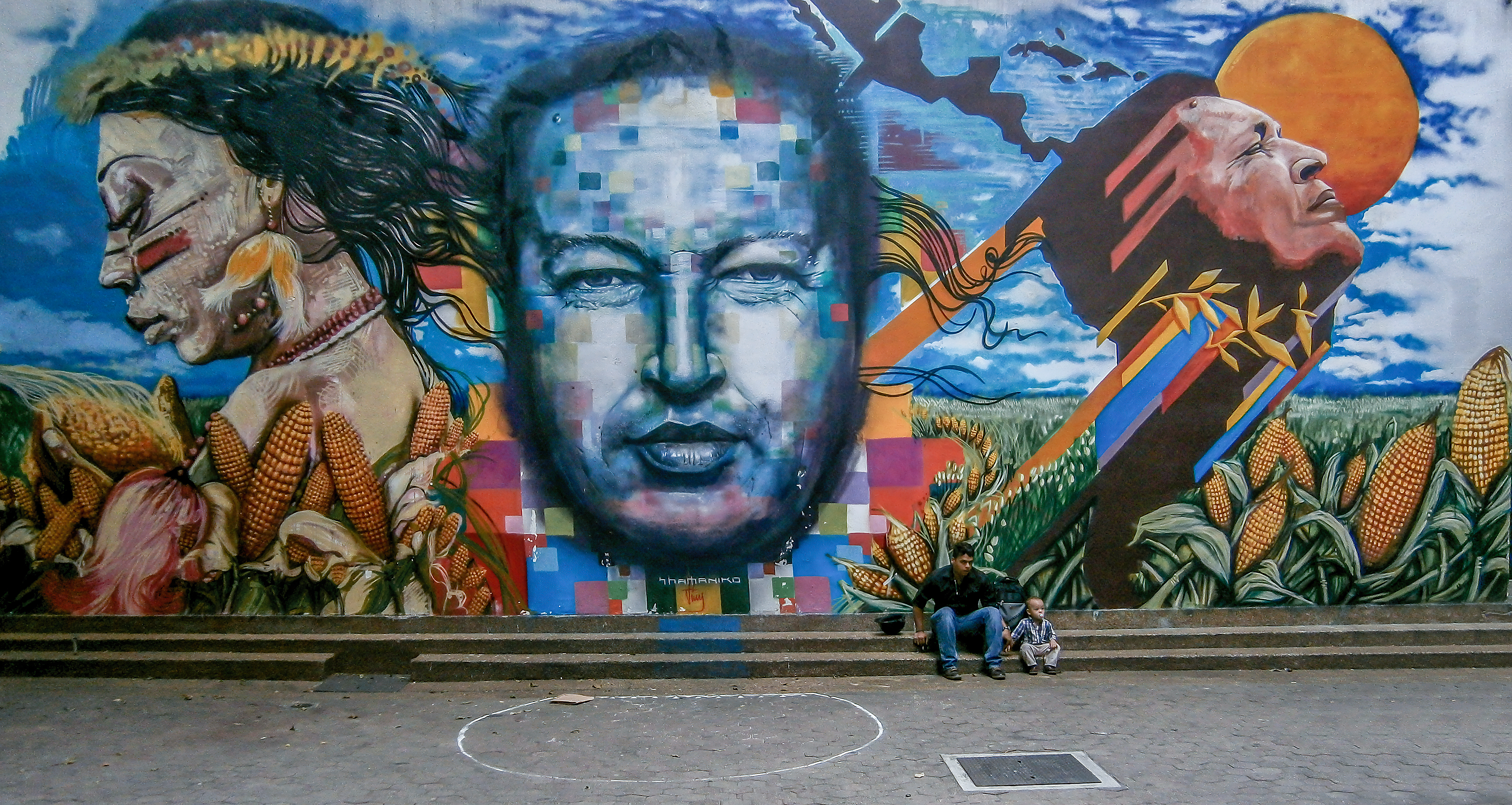 Mural de Chavez y su Asunción al cielo